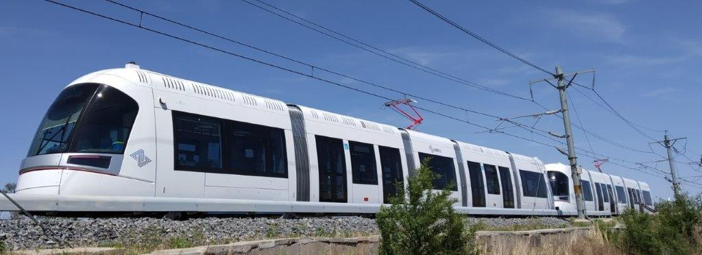 Les rames du métro de Tel Aviv en essais dans leurs usines en Chine en juin 2019.